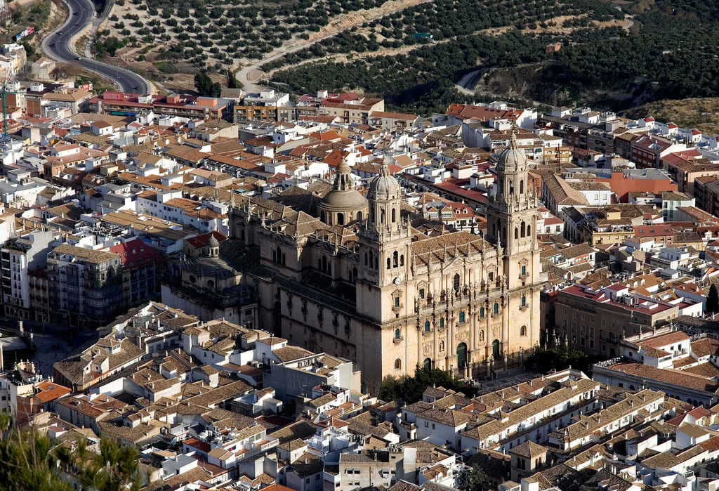 Típica foto de la Catedral de Jaén desde el cerro de Santa Catalina.